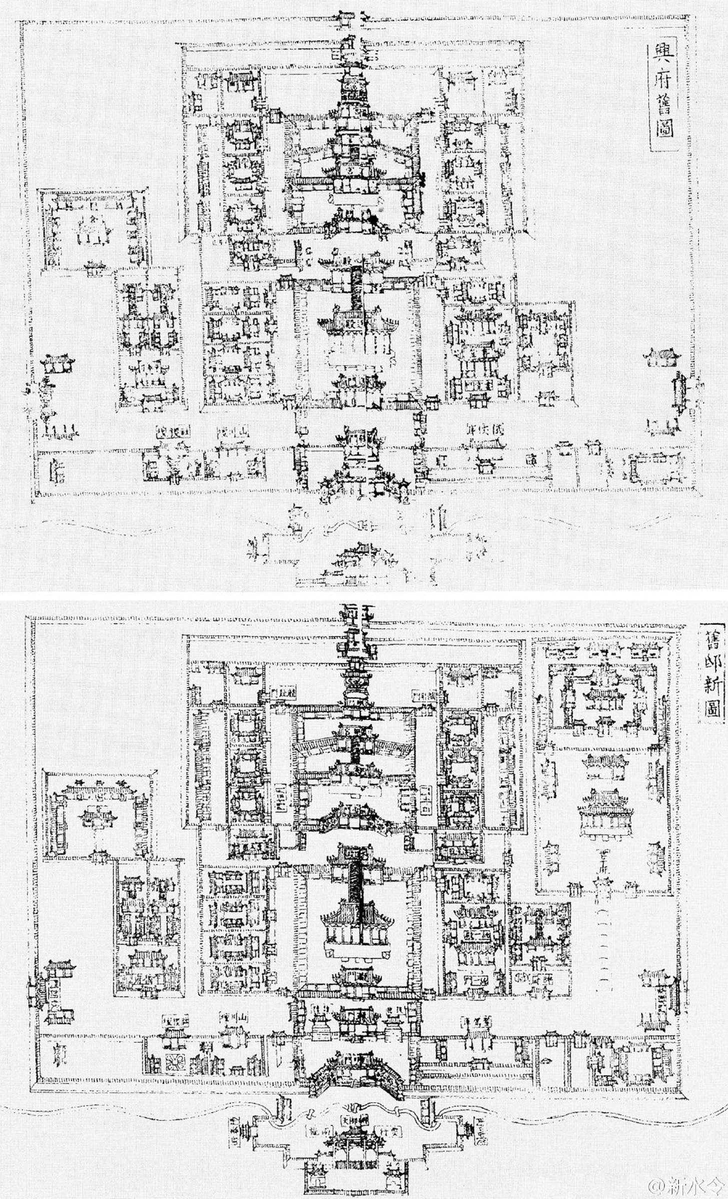 明朝湖广布政使司承天府钟祥县兴王府平面图